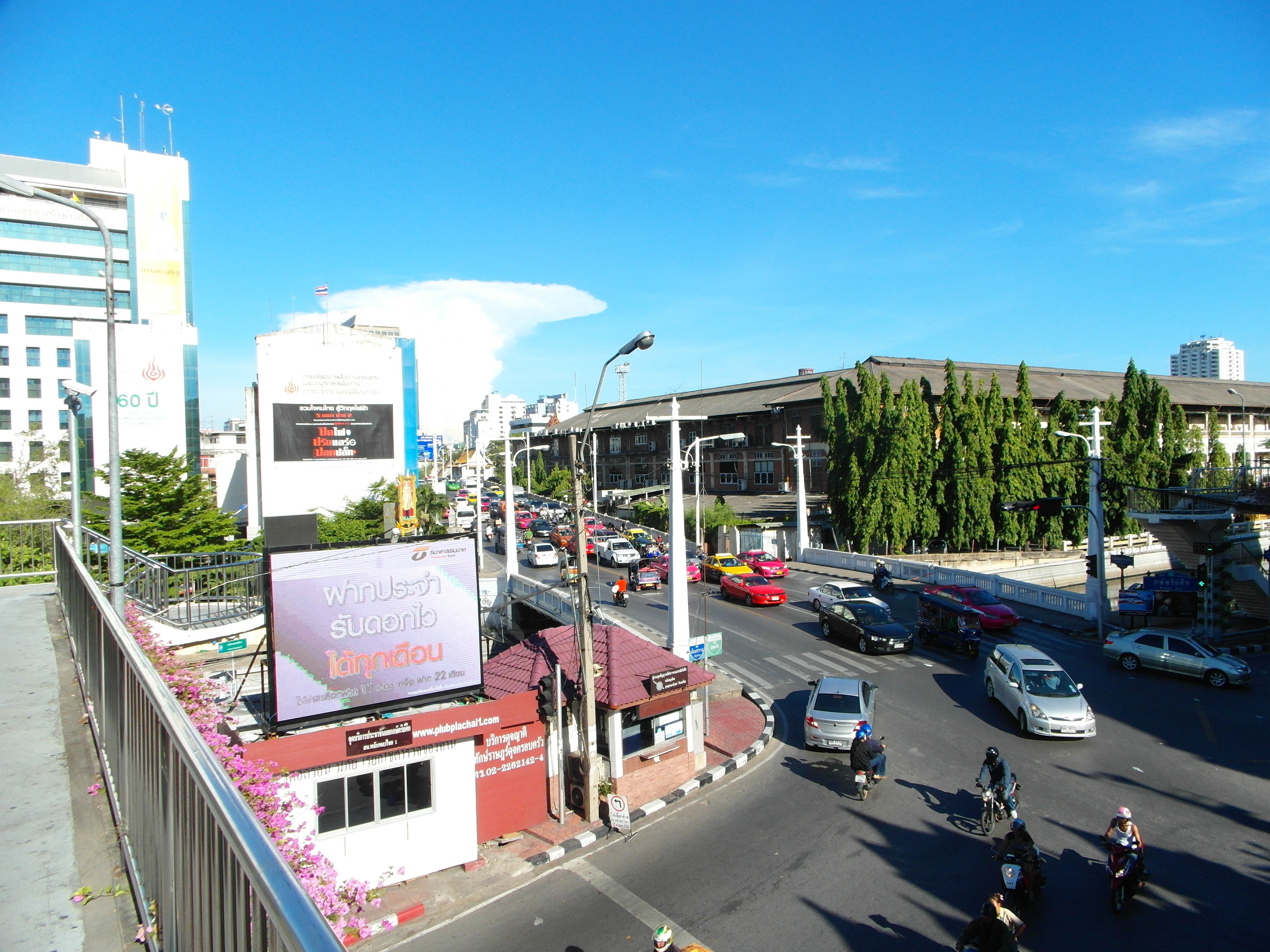 Bangkok 2013 april